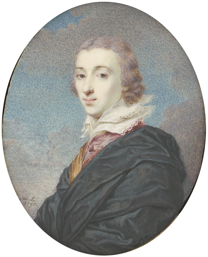 Portret młodego mężczyzny (Konstantego Czartoryskiego (?))